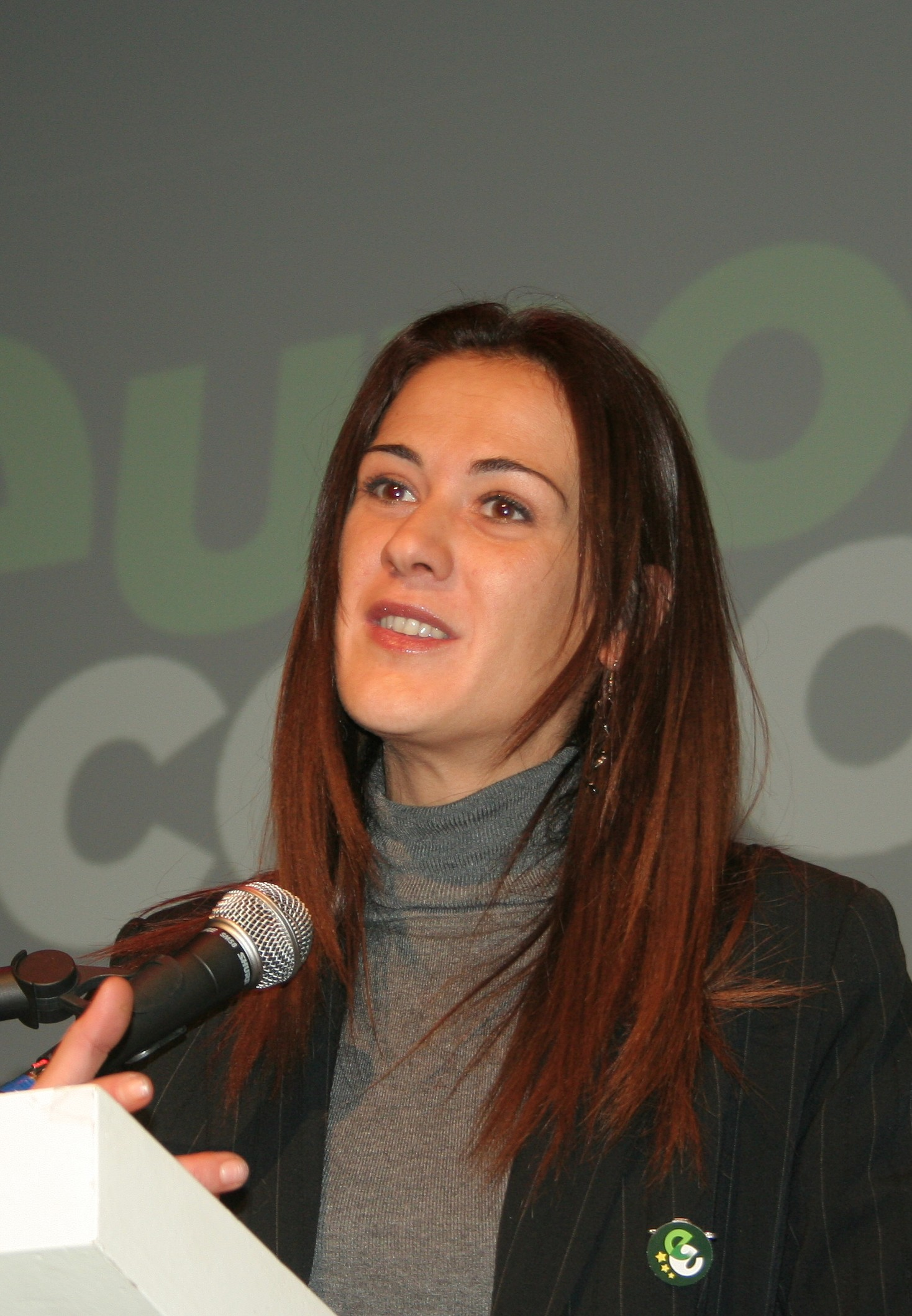 Sandrine Belier, Meeting Europe-Écologie à Vesoul